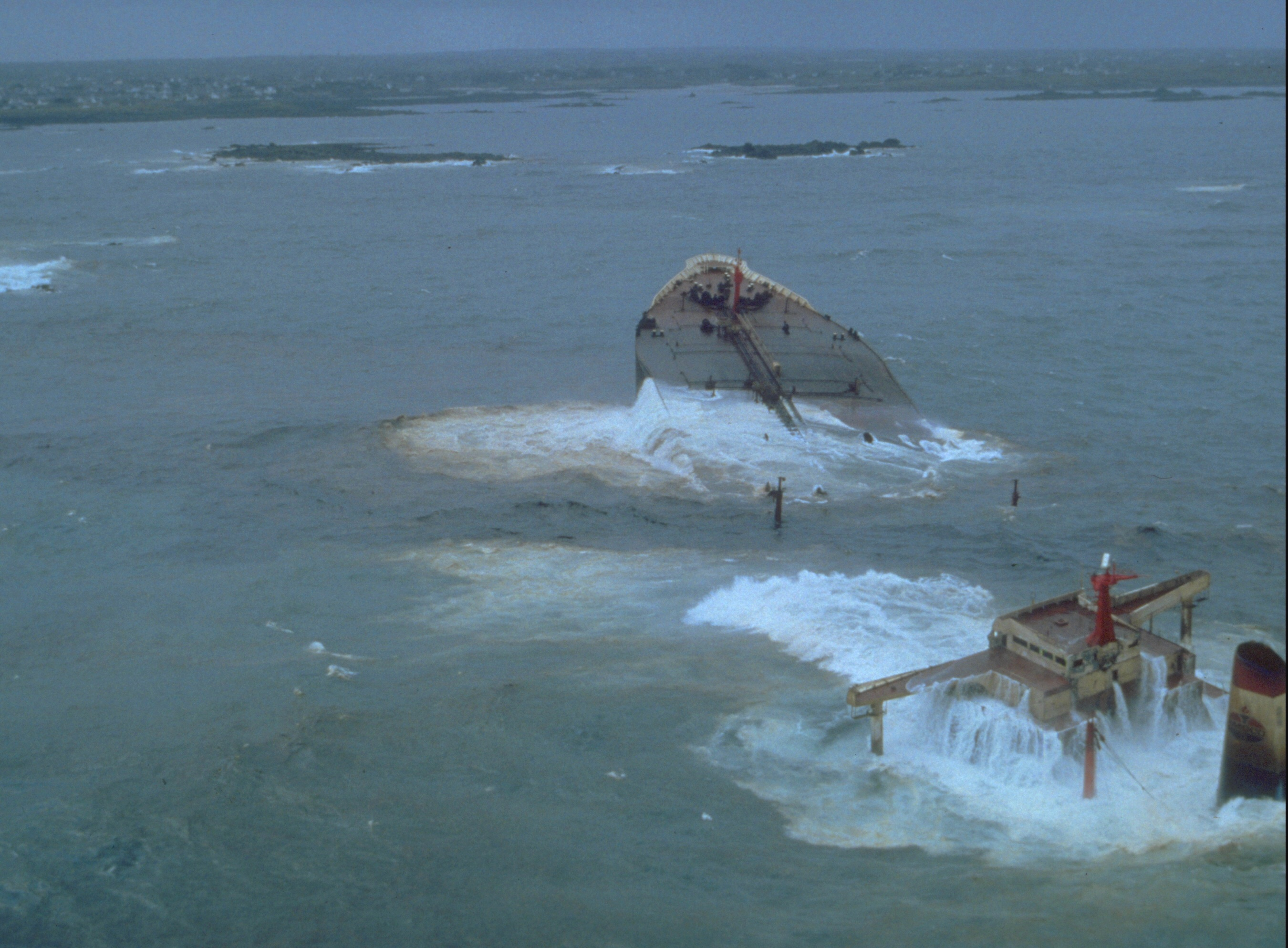 Amoco Cadiz grounding